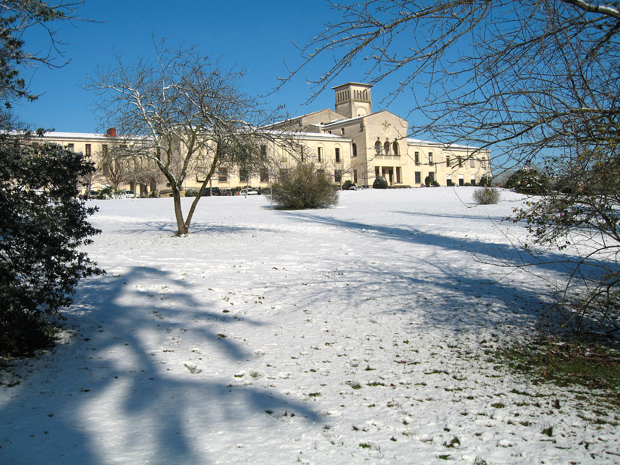 Université Bordeaux 1, domaine du Haut Carré, Talence, France